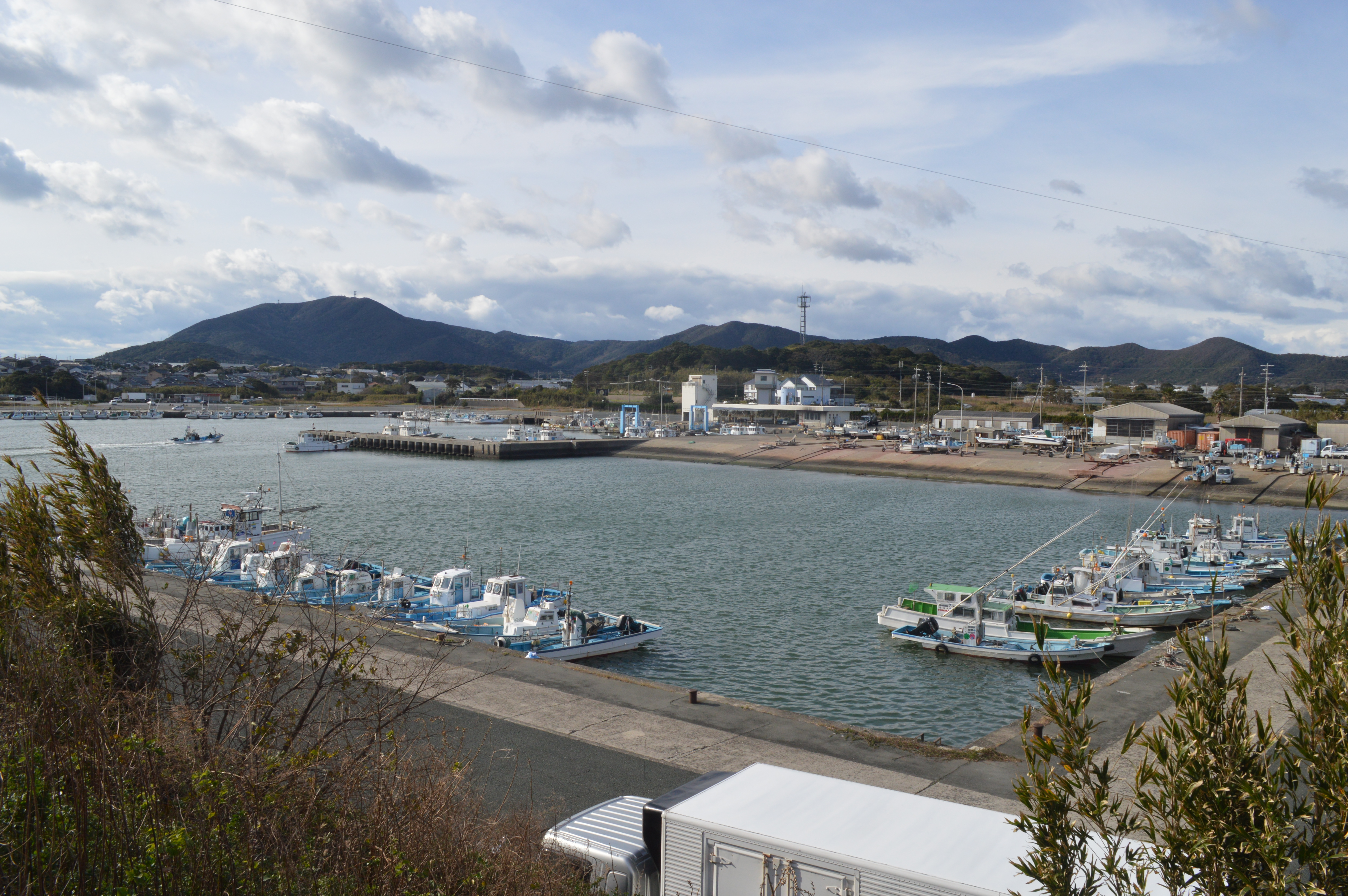 愛知県田原市の赤羽根漁港。太平洋。